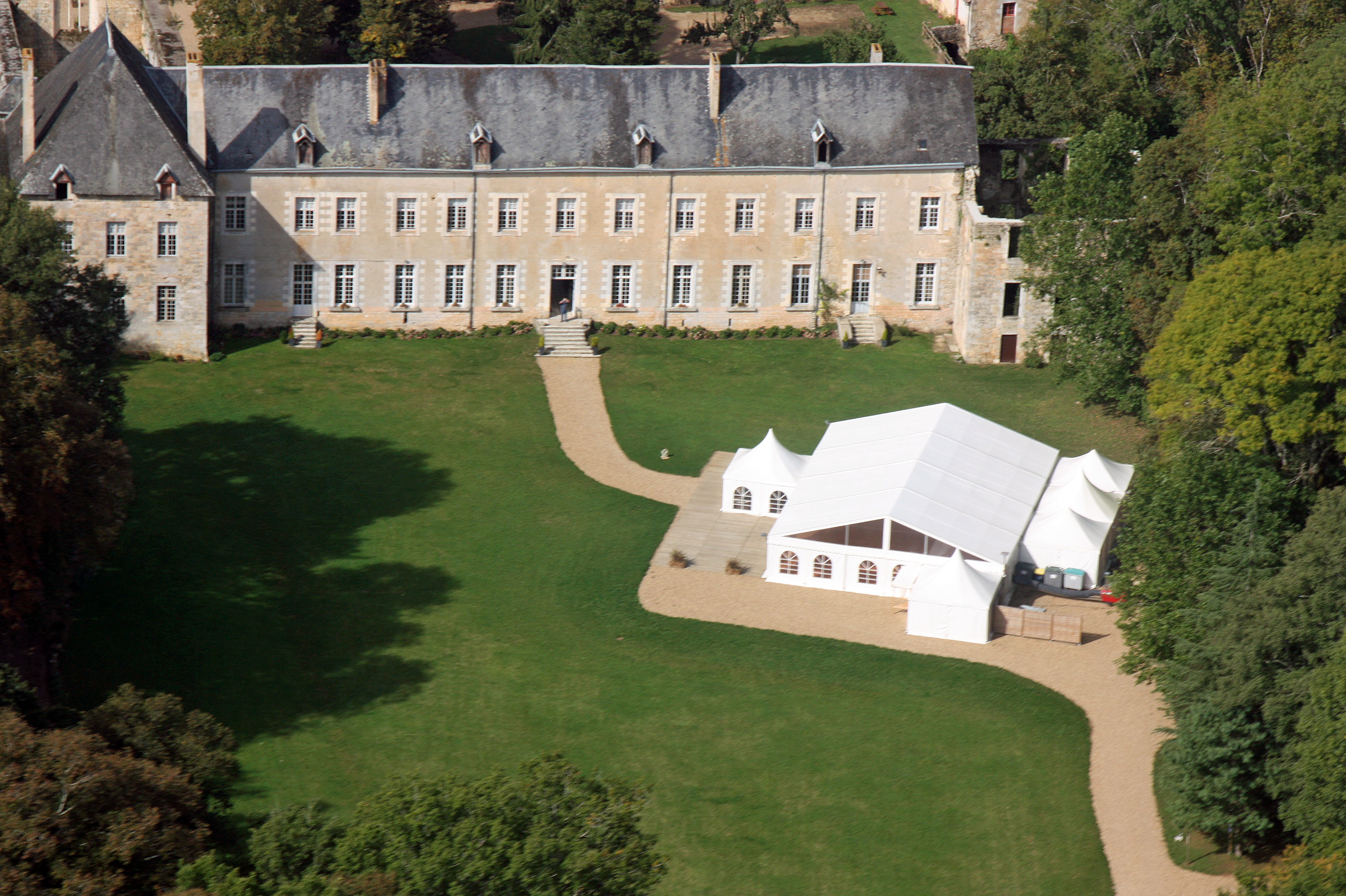 Abbaye du Pin